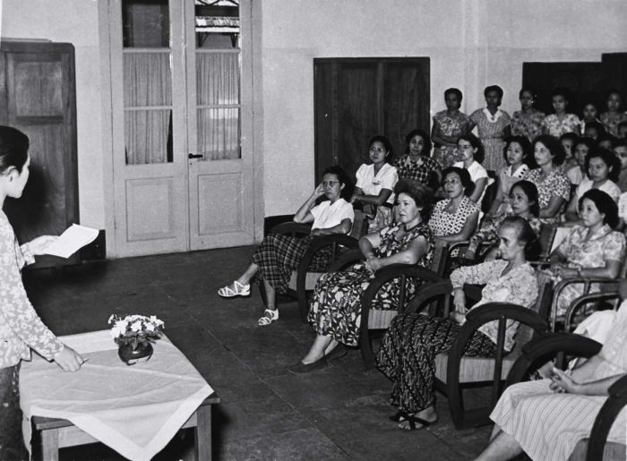 Foto. Hari Kartini.